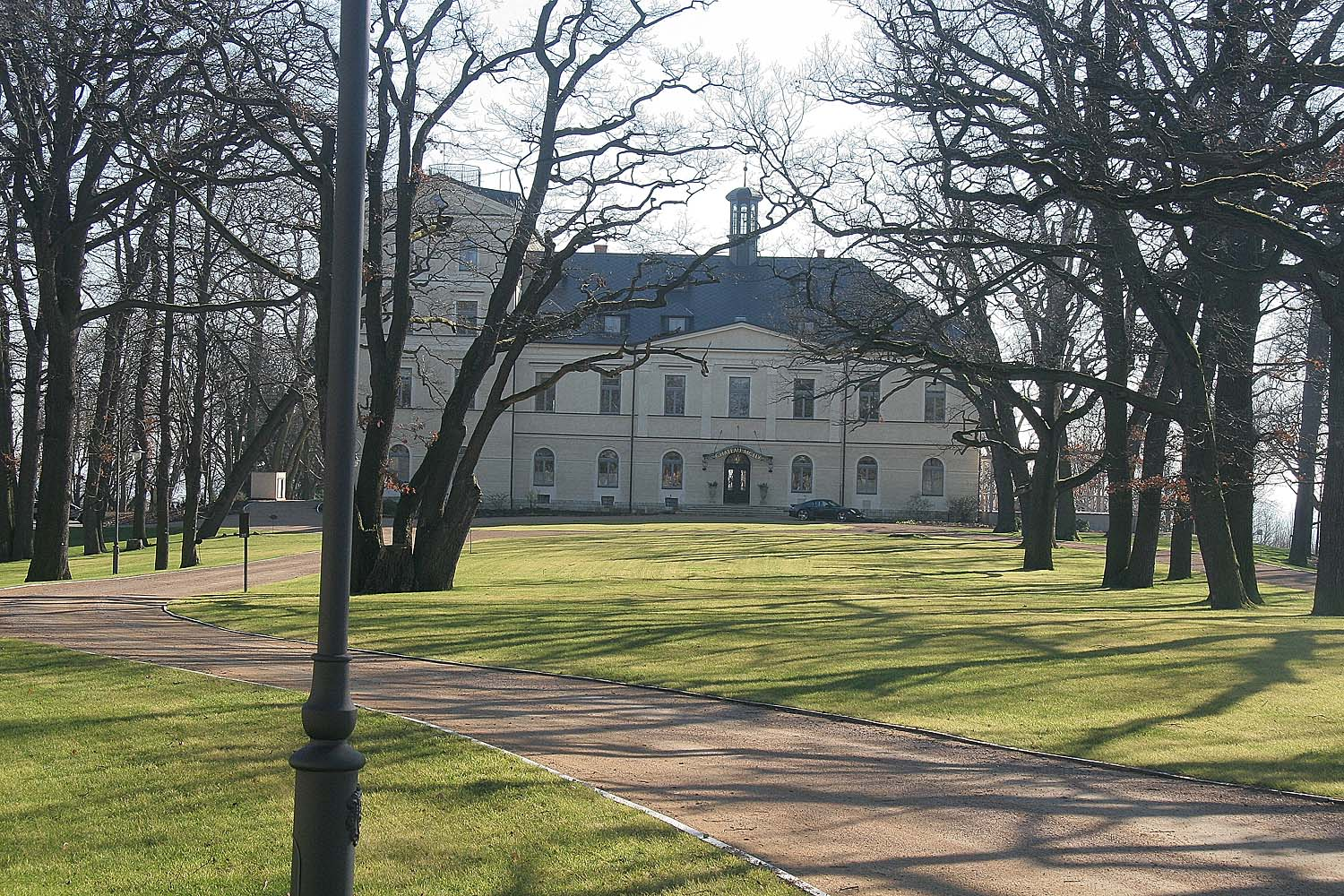 Mcely - nově rekonstruovaný barokní zámek, district Nymburk autor:Prazak date: 17. 2. 2007